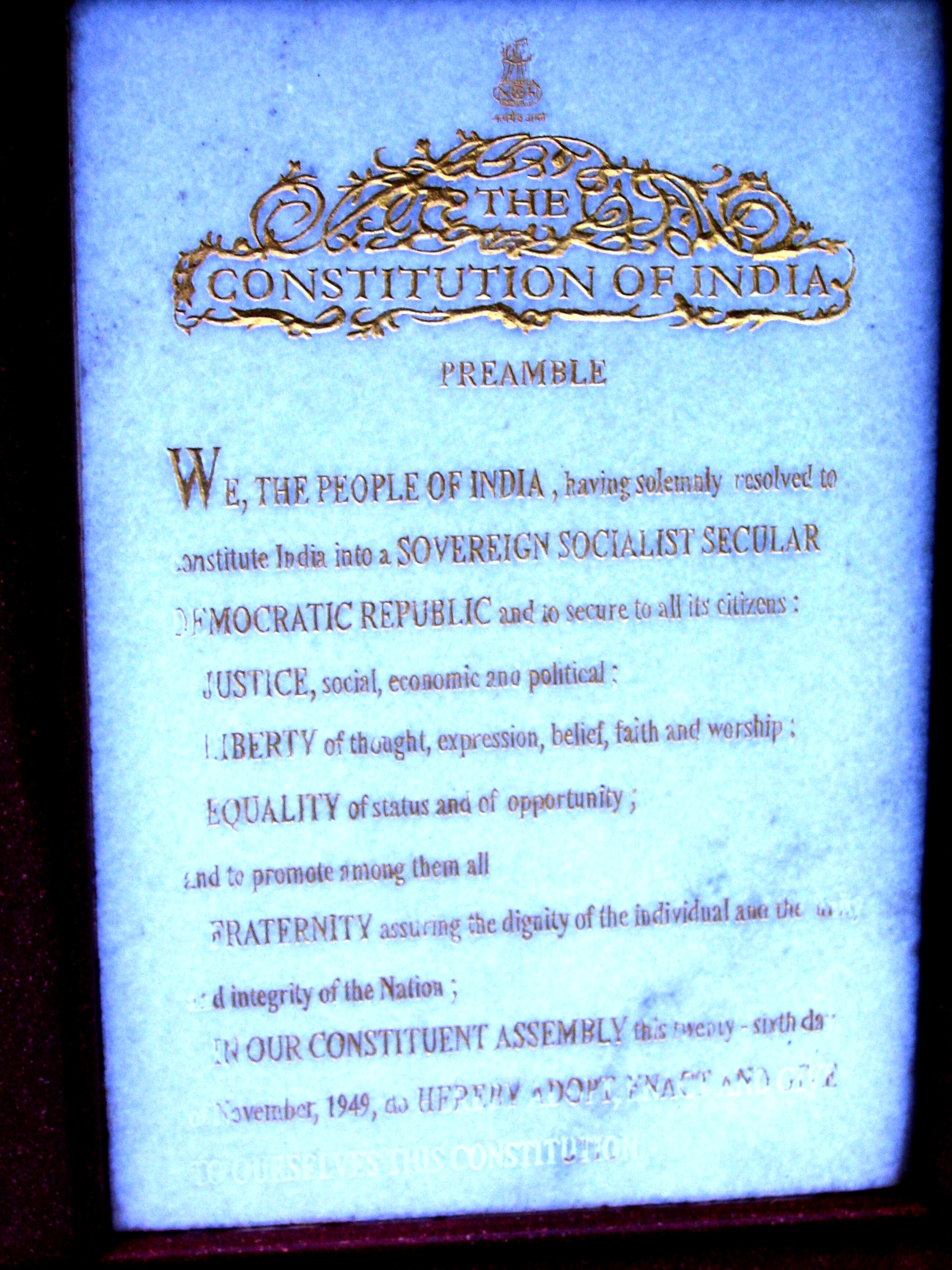 মুম্বই বিশ্বদ্যিালয়ের চত্বরে স্থাপিত ইন্ডিয়ার সংবিধানের প্রস্তাবনা